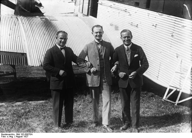 Vor dem grossen Ozeanflug der Junkersmaschinen "Europa" und "Bremen". Erste Aufnahmen der Besatzungen beider Ozeanflugzeuge kurz vor dem grossen Start in Dessau! Die zweite Besatzung der grossen Junkers-Ozeanmaschine "Bremen" [Text nach Bild 102-4634] Information added by Wikimedia users.